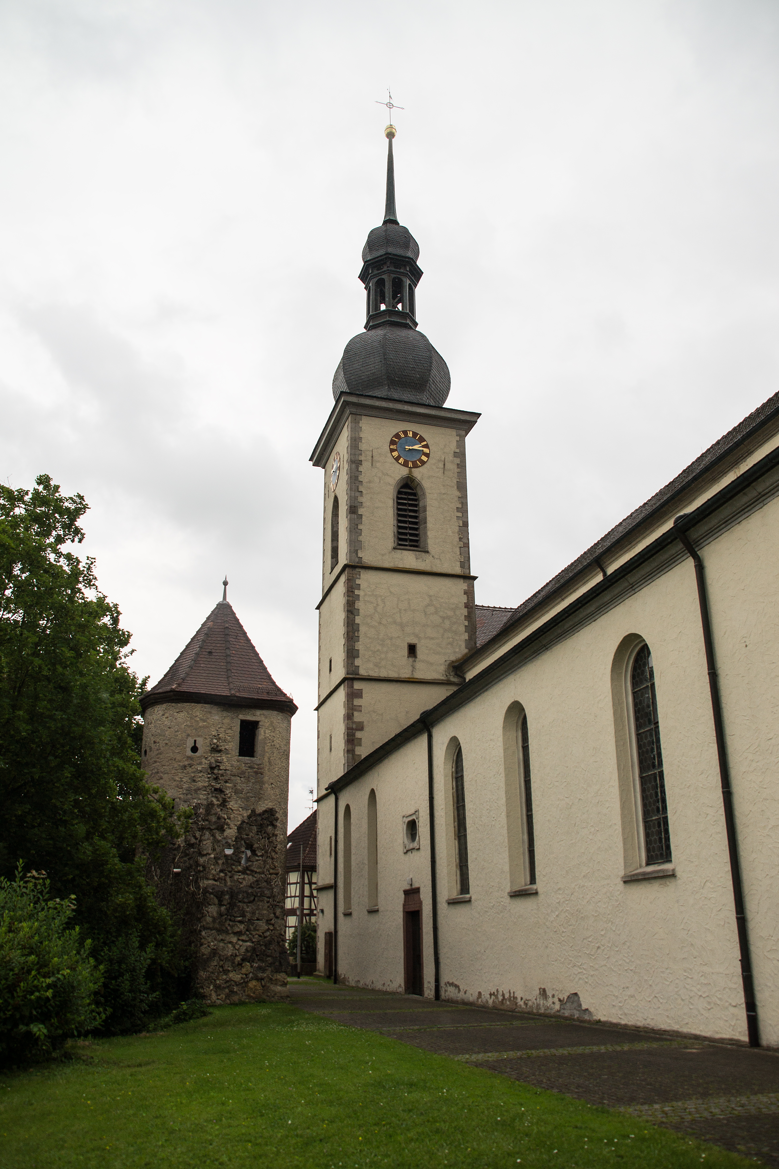 St. Jakobus Kirche Lauda